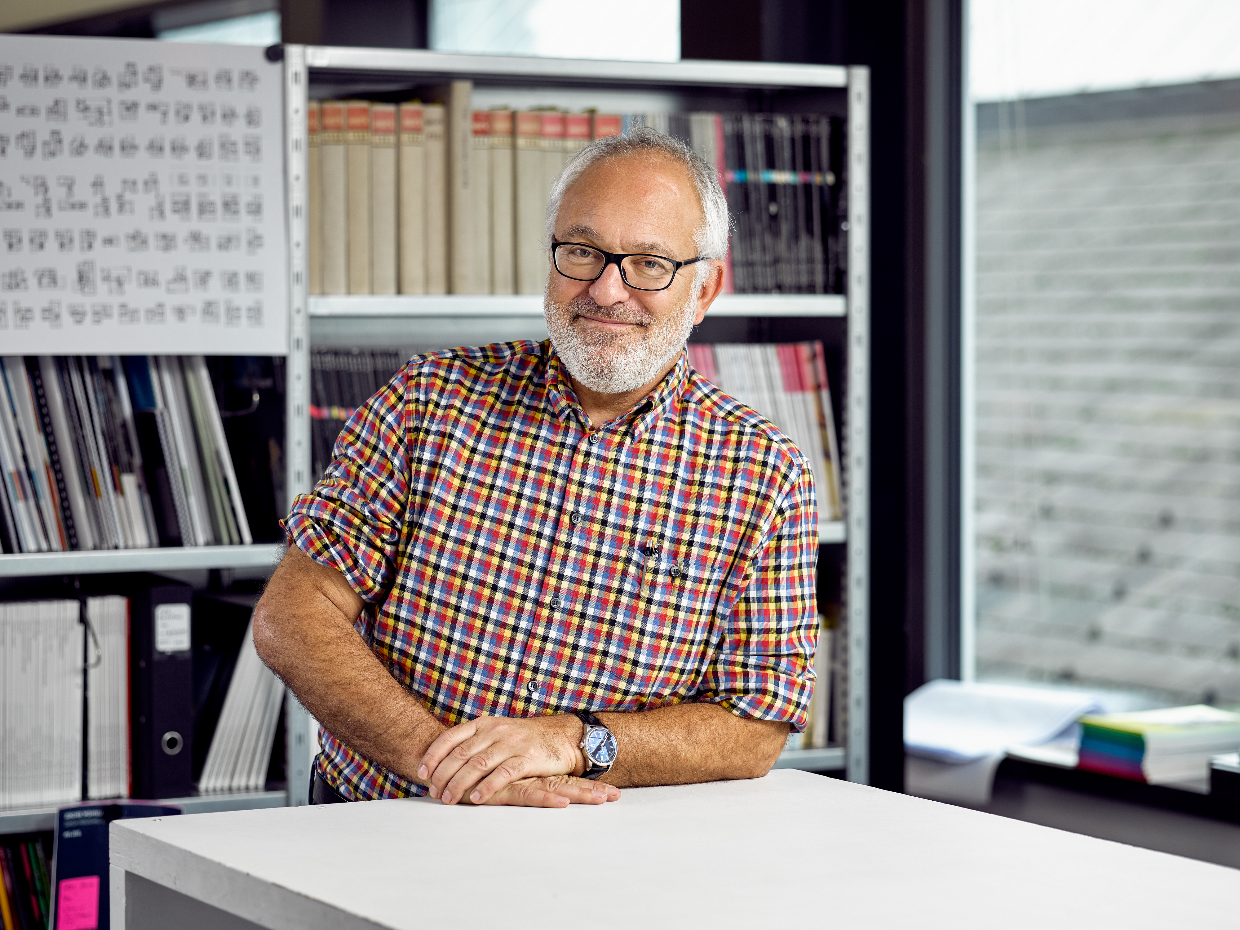 Patrick Gmür, Portrait, Architekt und Stadtplaner, Zürich